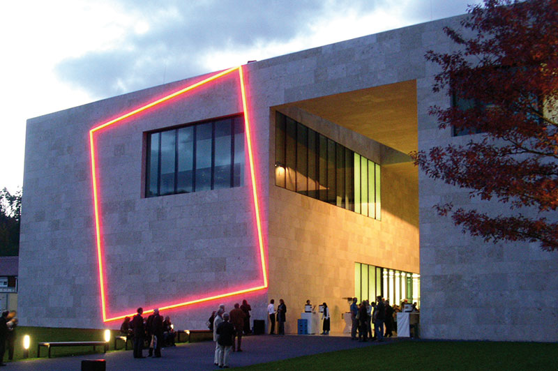 „Lichtquadrat“ am Museum Ritter in Waldenbuch bei Stuttgart aus Waltraut Coopers Werkserie „Rainbow“, beauftragt für die Eröffnung der Ausstellung „Bewegung im Quadrat“ 2006. Foto: Dietmar Guderian